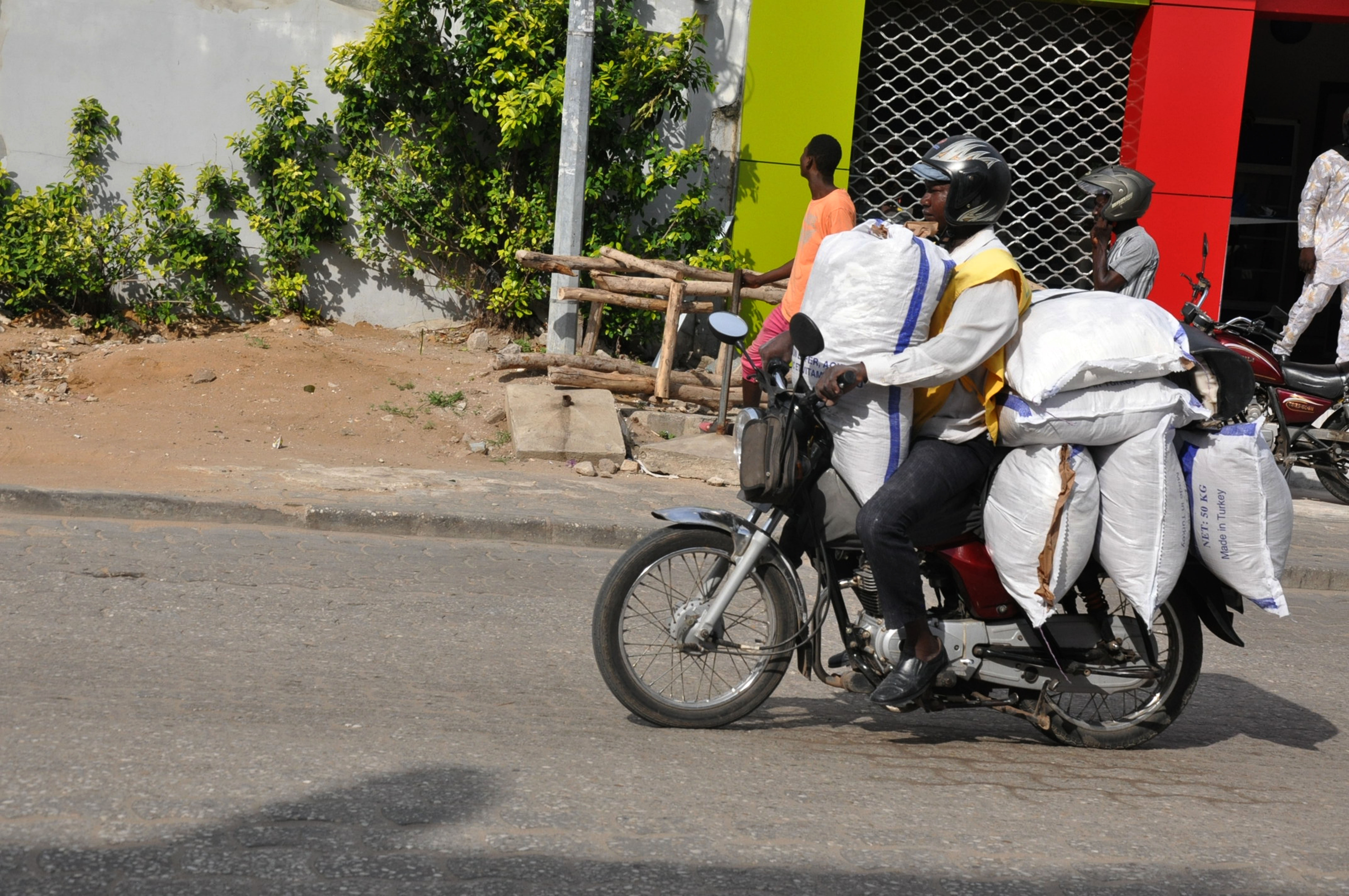 7 -this zemidjan has loaded more than 400 kg of rice on his motorcycle This is an image with the theme "Africa on the Move or Transport" from: Benin